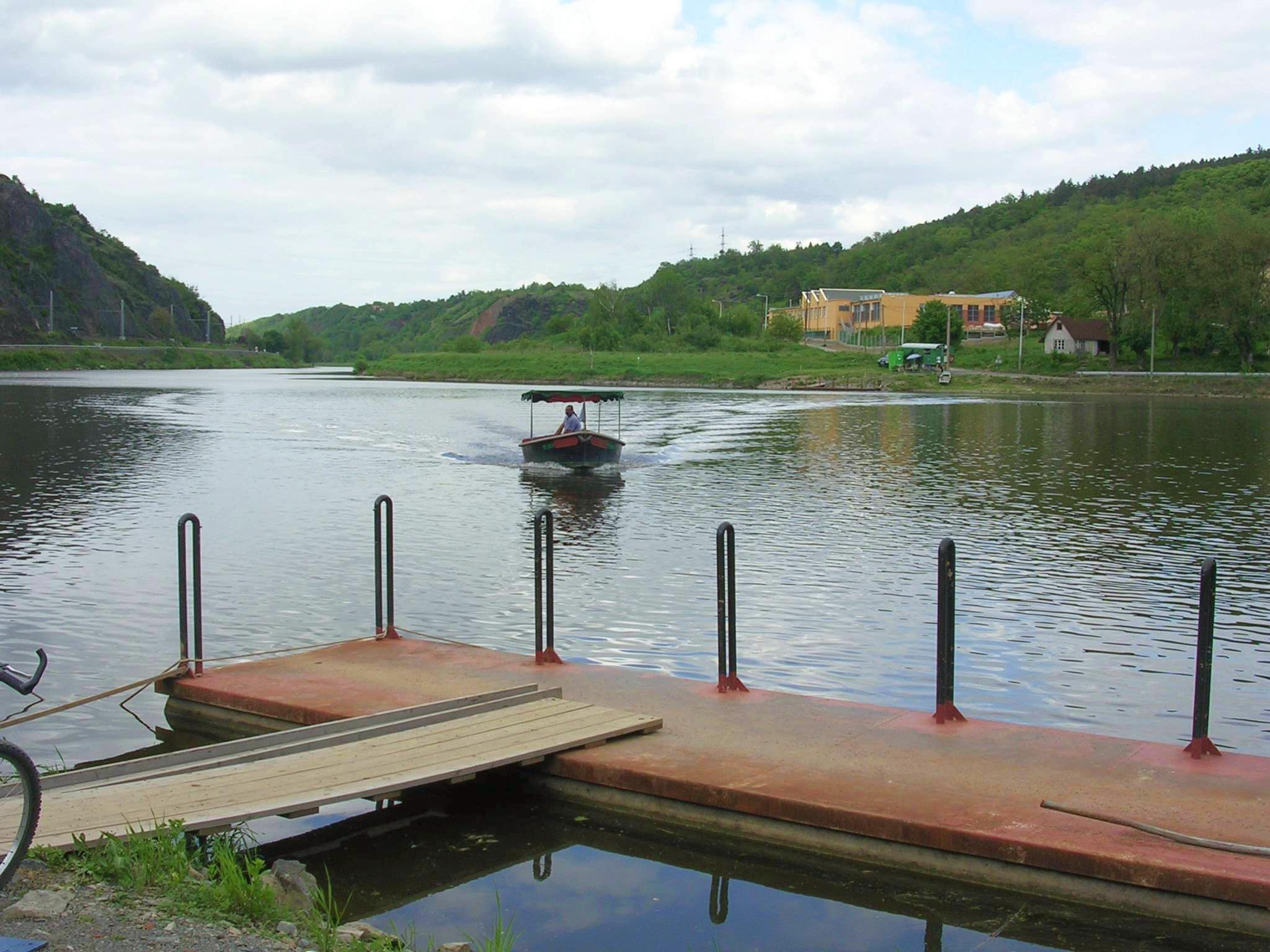 Přívoz Sedlec-Zámky, Praha: pohled ze Sedlce k Zámkům